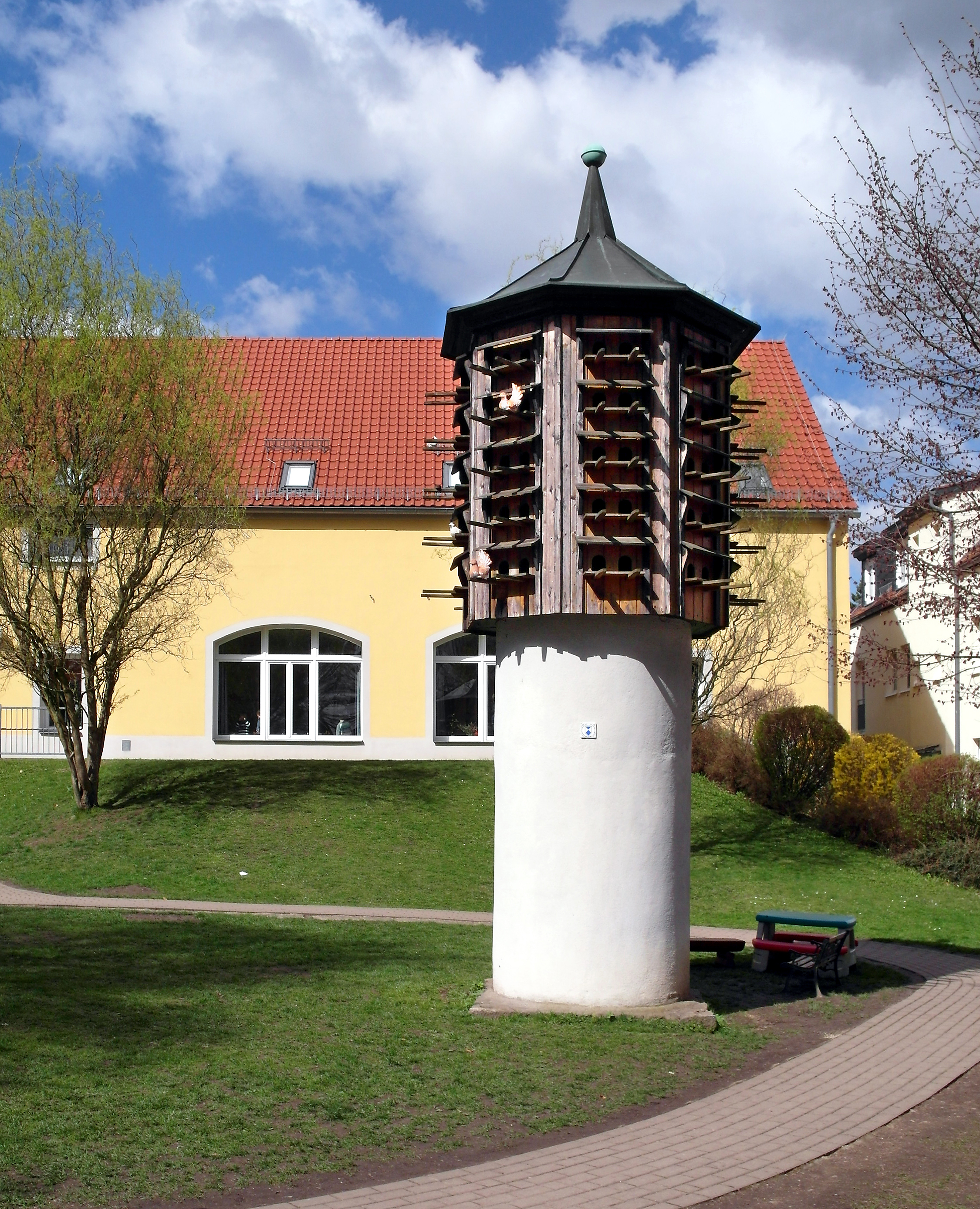 06.04.2017 02681 Schirgiswalde: Taubenschlag (GMP: 51.079075,14.428706) auf dem Hof des ehem. Ritterguts Schirgiswalde, Am Hof 1. [SAM9269.JPG]20170406380DR.JPG(c)Blobelt